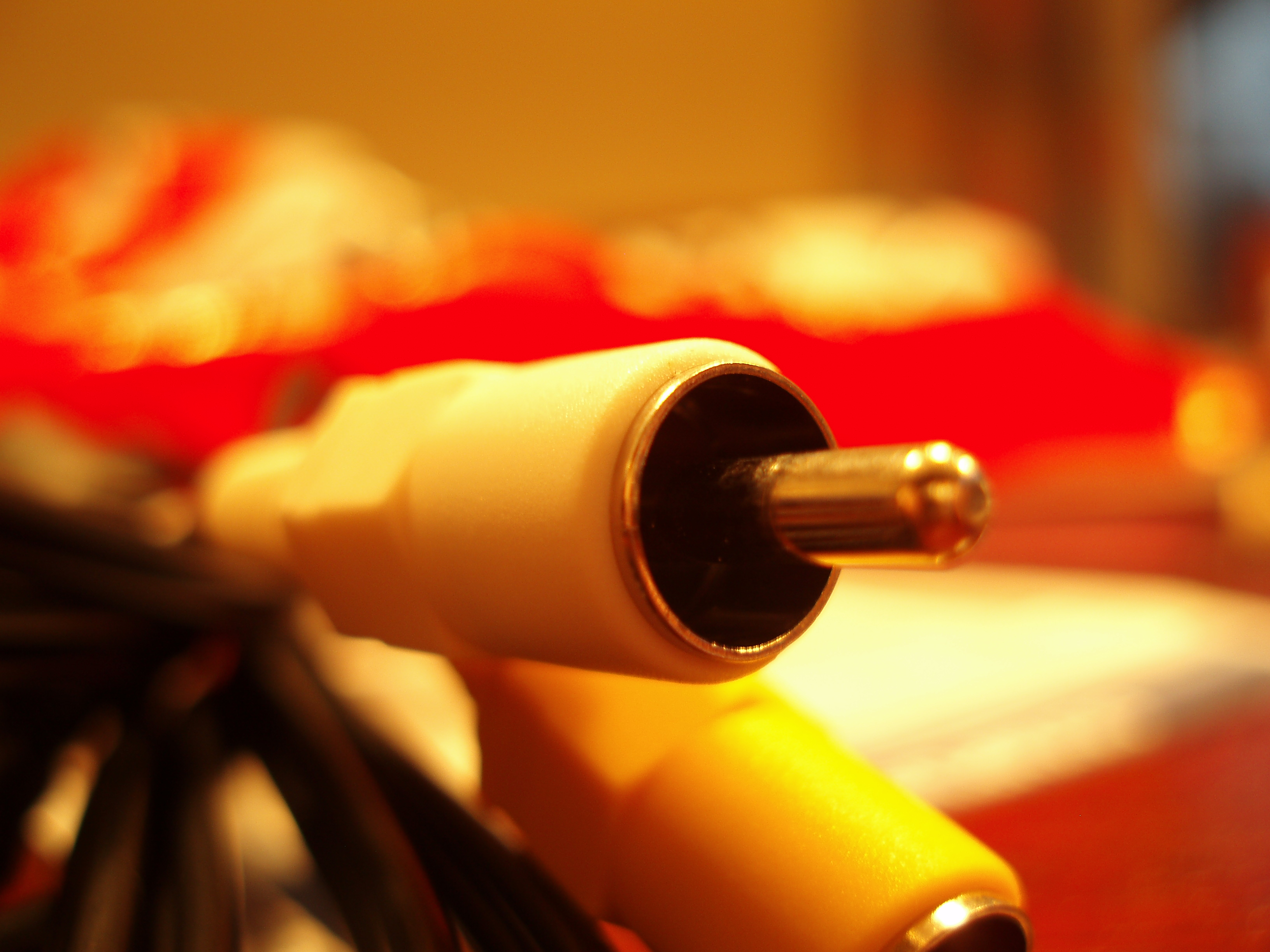 Zelfgemaakte foto van een tulpstekker.